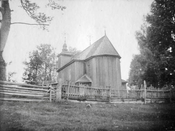 Беларуская (тарашкевіца): Барань (Barań). Царква